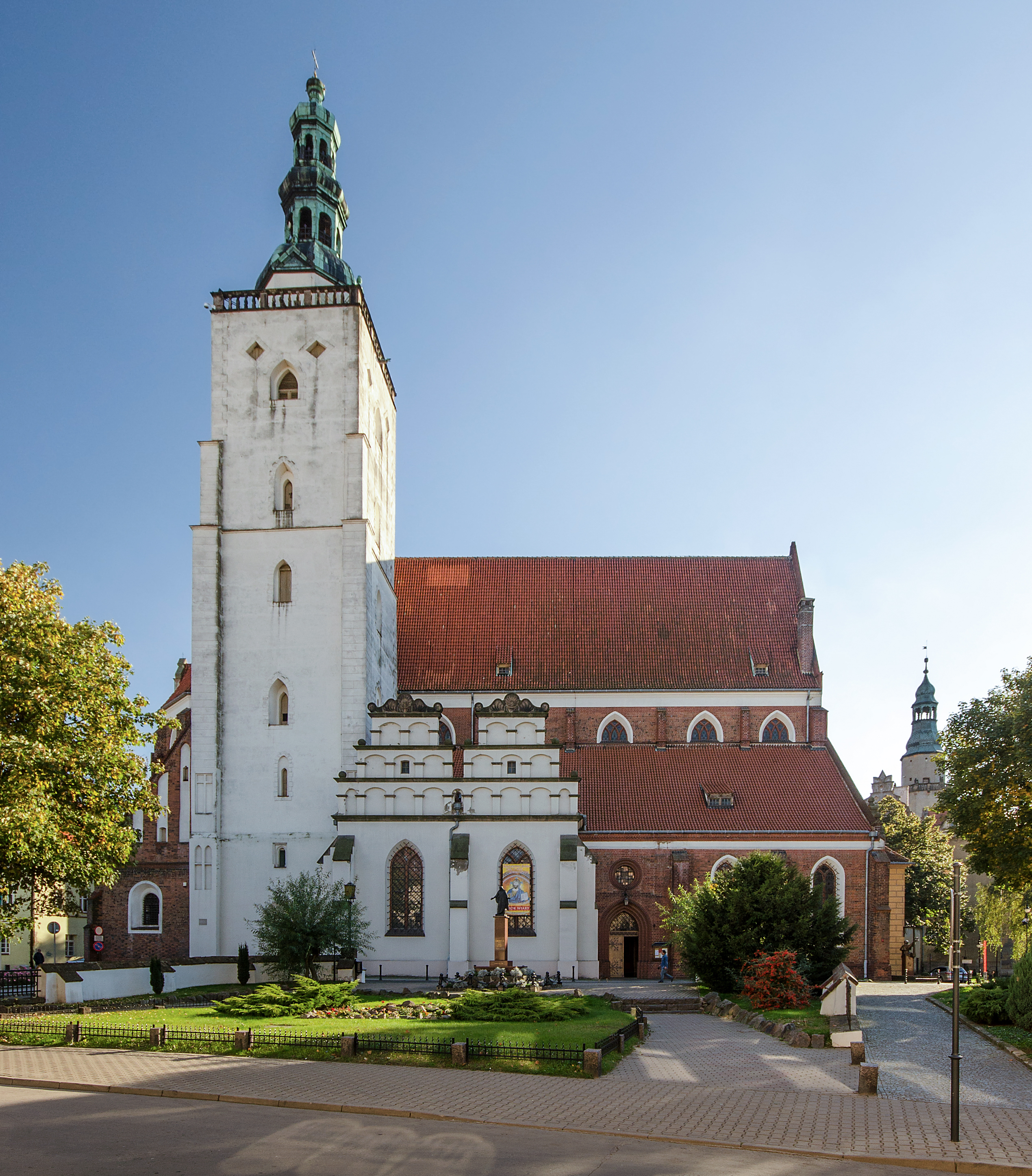 Oleśnica, kościół par. p.w. św. Jana Apostoła, kon. XIII, XIV, XVI, pocz. XX